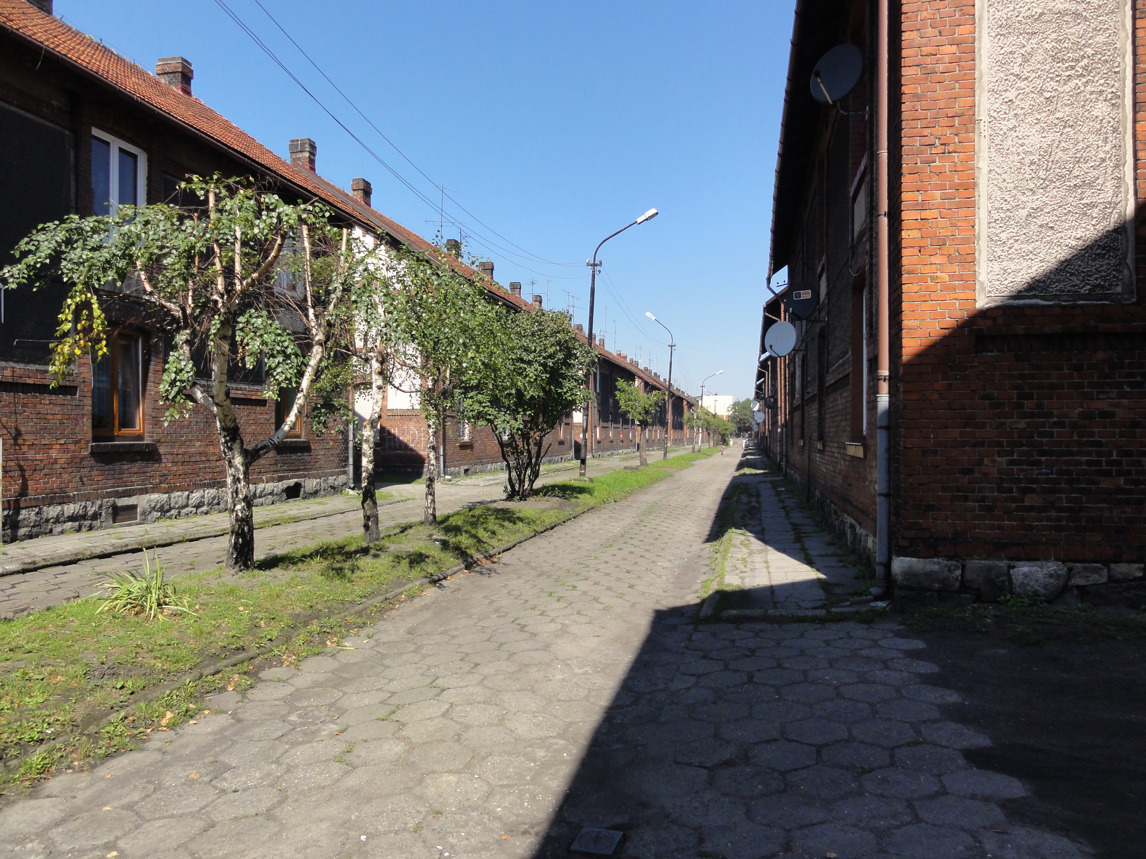 Kolonia robotnicza na ul. Węglowej w Czechowicach-Dziedzicach